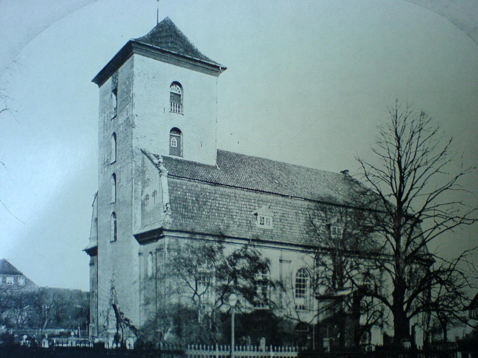 ... Sonstiges: ...